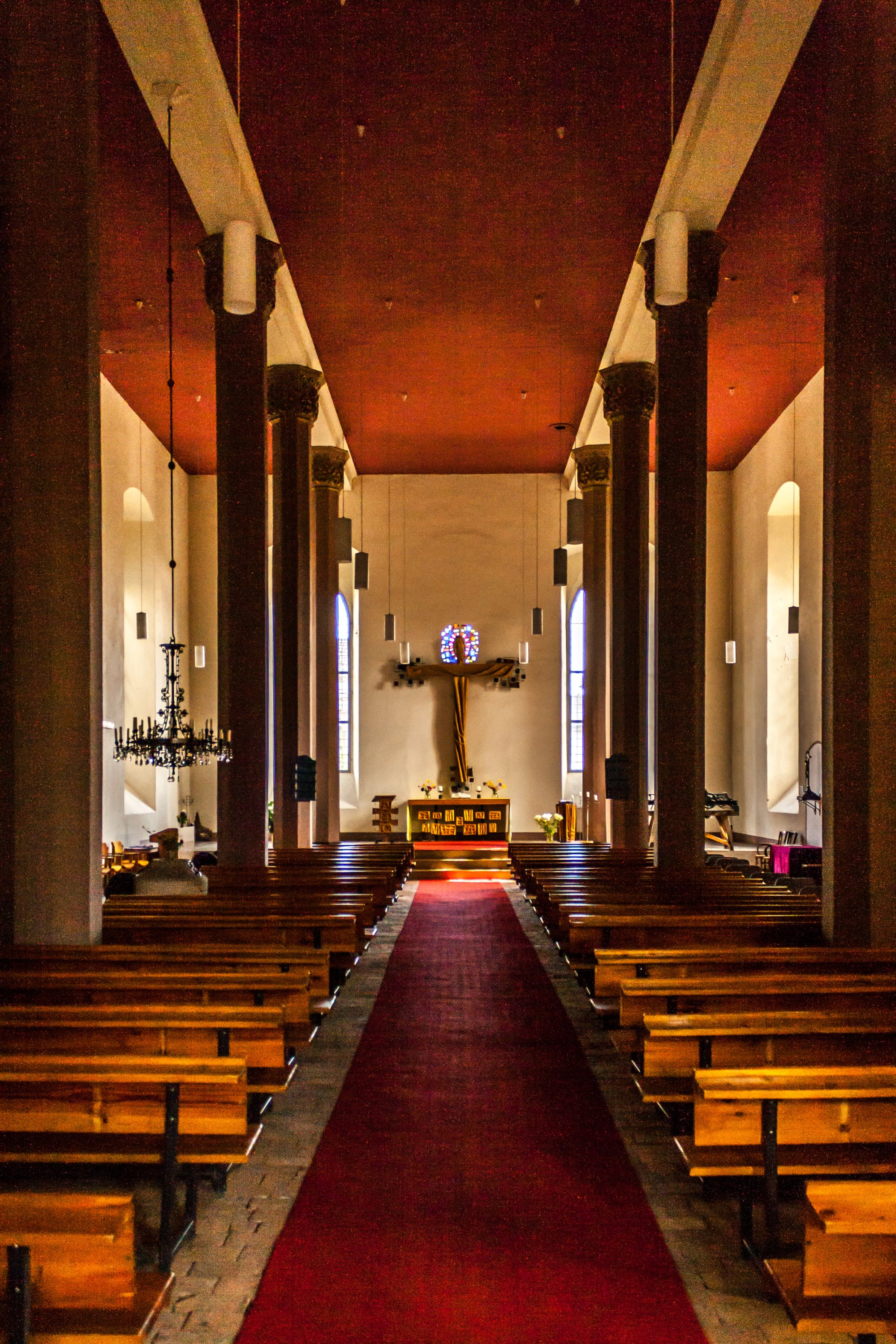 Kreuzkirche Innenansicht